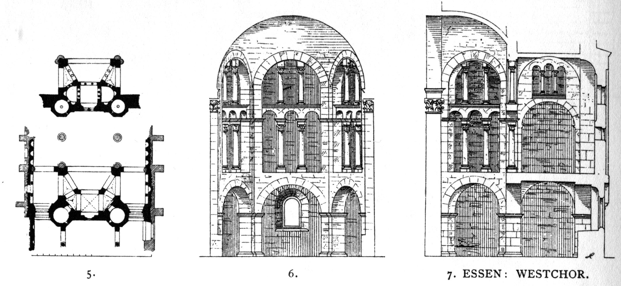 Essen, Münsterkirche, Nonnenchor